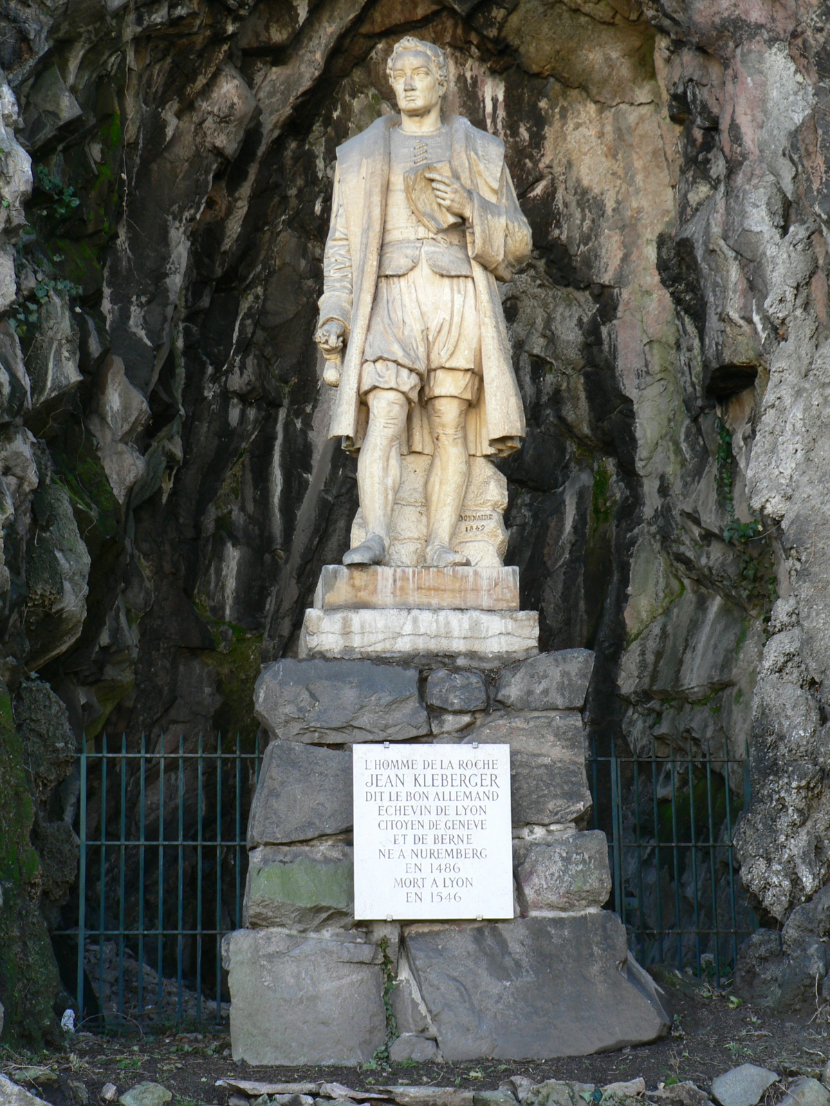 Statue de Kleberger connu comme L'homme de la roche